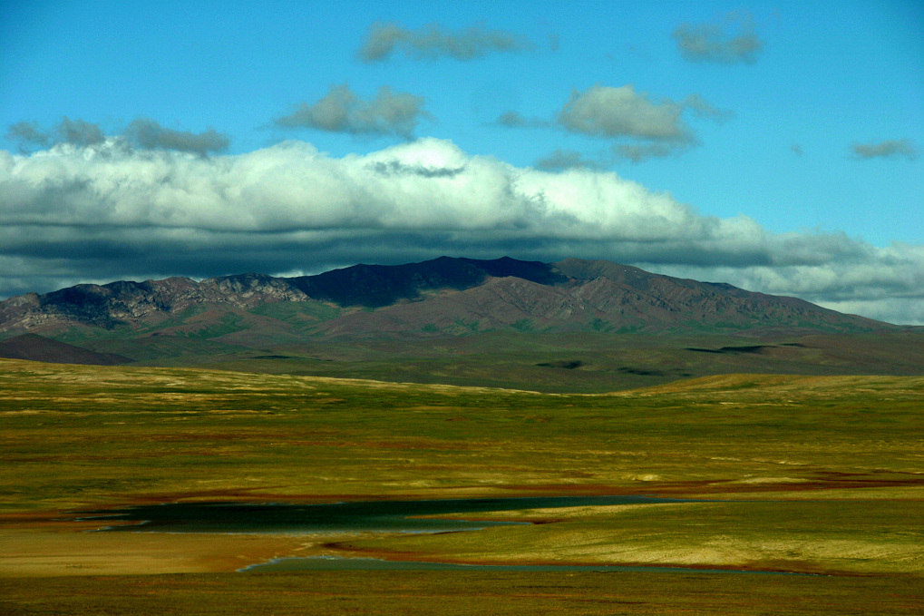 八月的可可西里